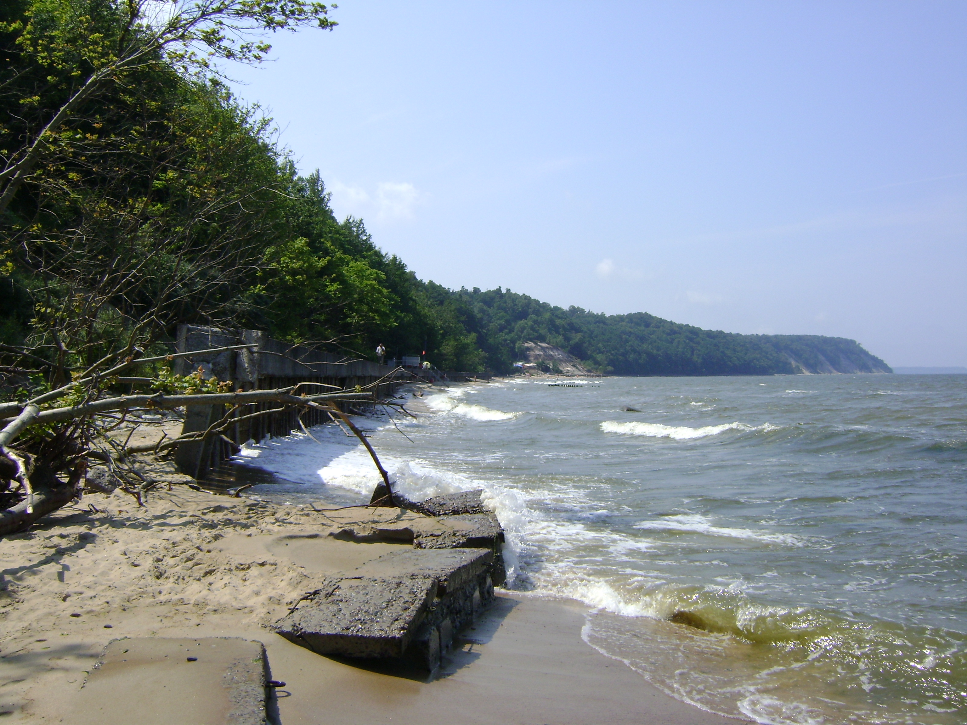 А ведь много лет назад, когда здесь ещё не было берегозащитных сооружений, здесь всегда был хороший (20-30 м шириной) песчаный пляж.